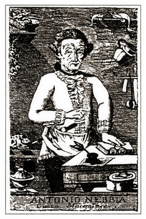 Ritratto di Antonio Nebbia. Dal libro: Antonio Nebbia, Il Cuoco Maceratese, Macerata, 1786. Riproduzione digitale dell'originale realizzata da Diego Cesetti Roscini.